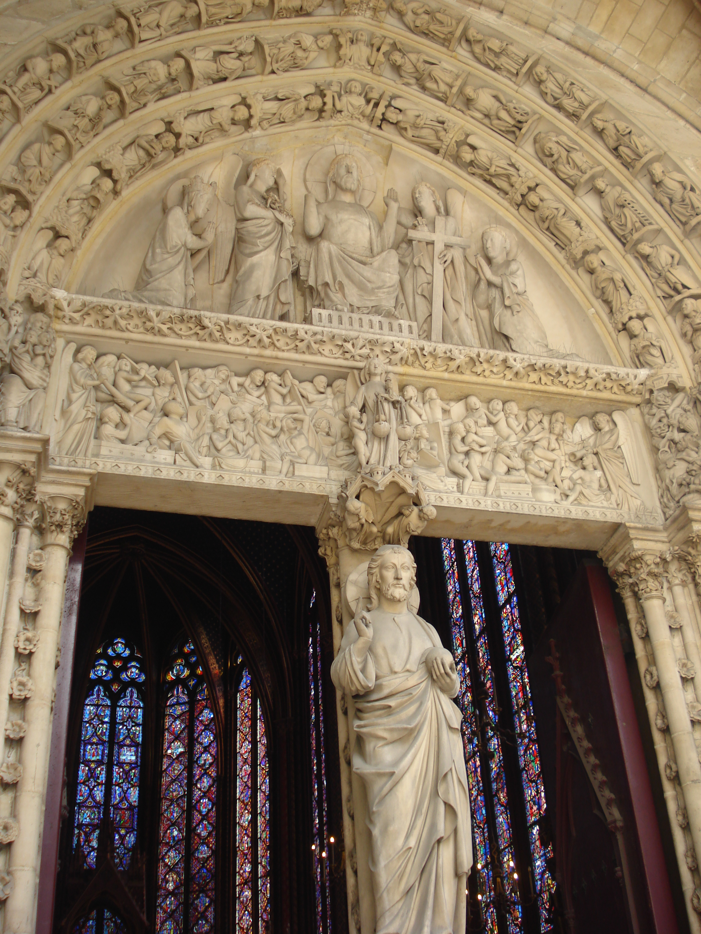 Sainte-Chapelle, Paris, Boulevard du Palais .